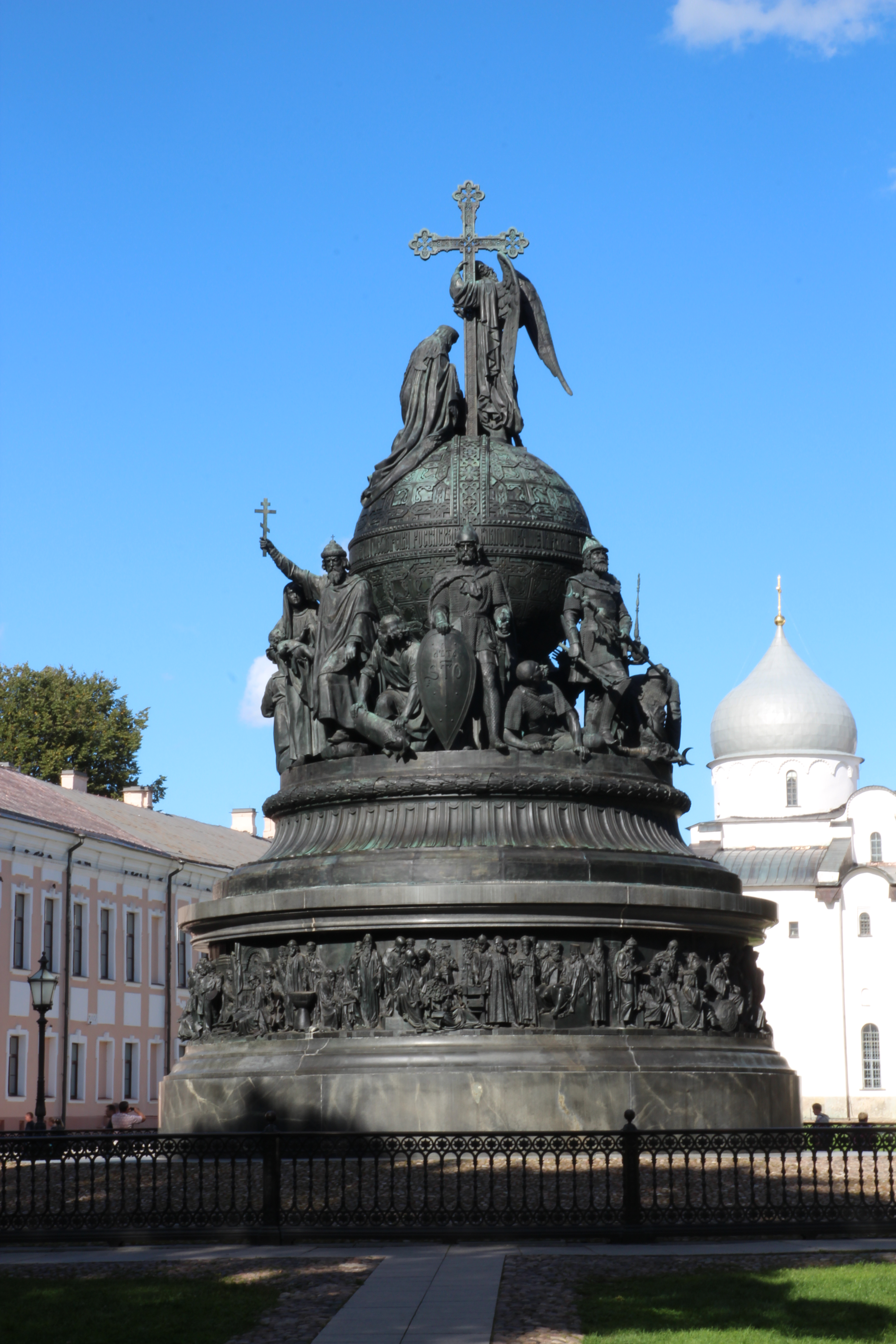 Памятник тысячелетию России